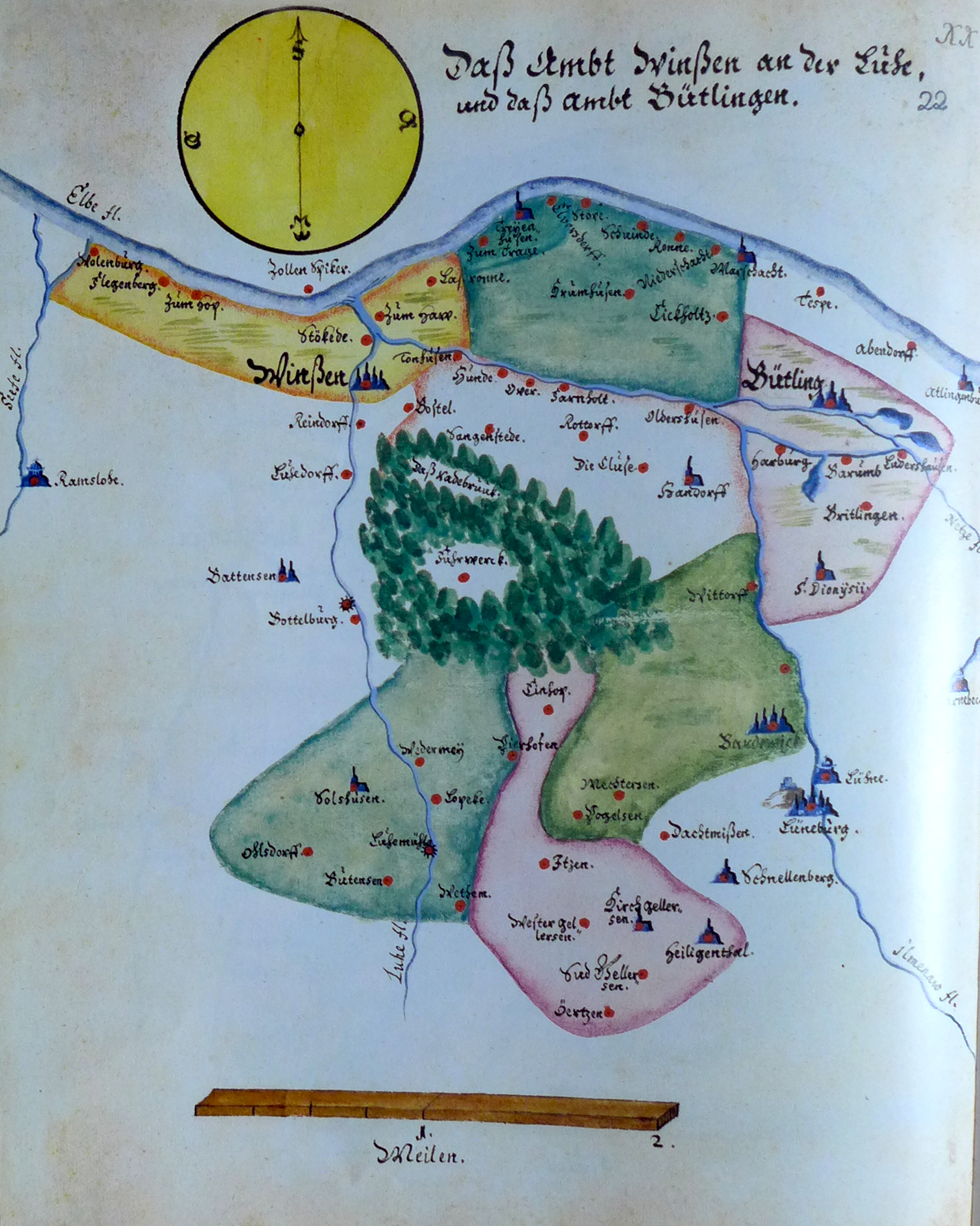 Ämteratlas des Fürstentums Lüneburg von Johannes Mellinger, um 1600 – Reproduktion der im Niedersächsischen Landesarchiv, Abteilung Hannover, lagernden Kopie um 1678 (vgl.